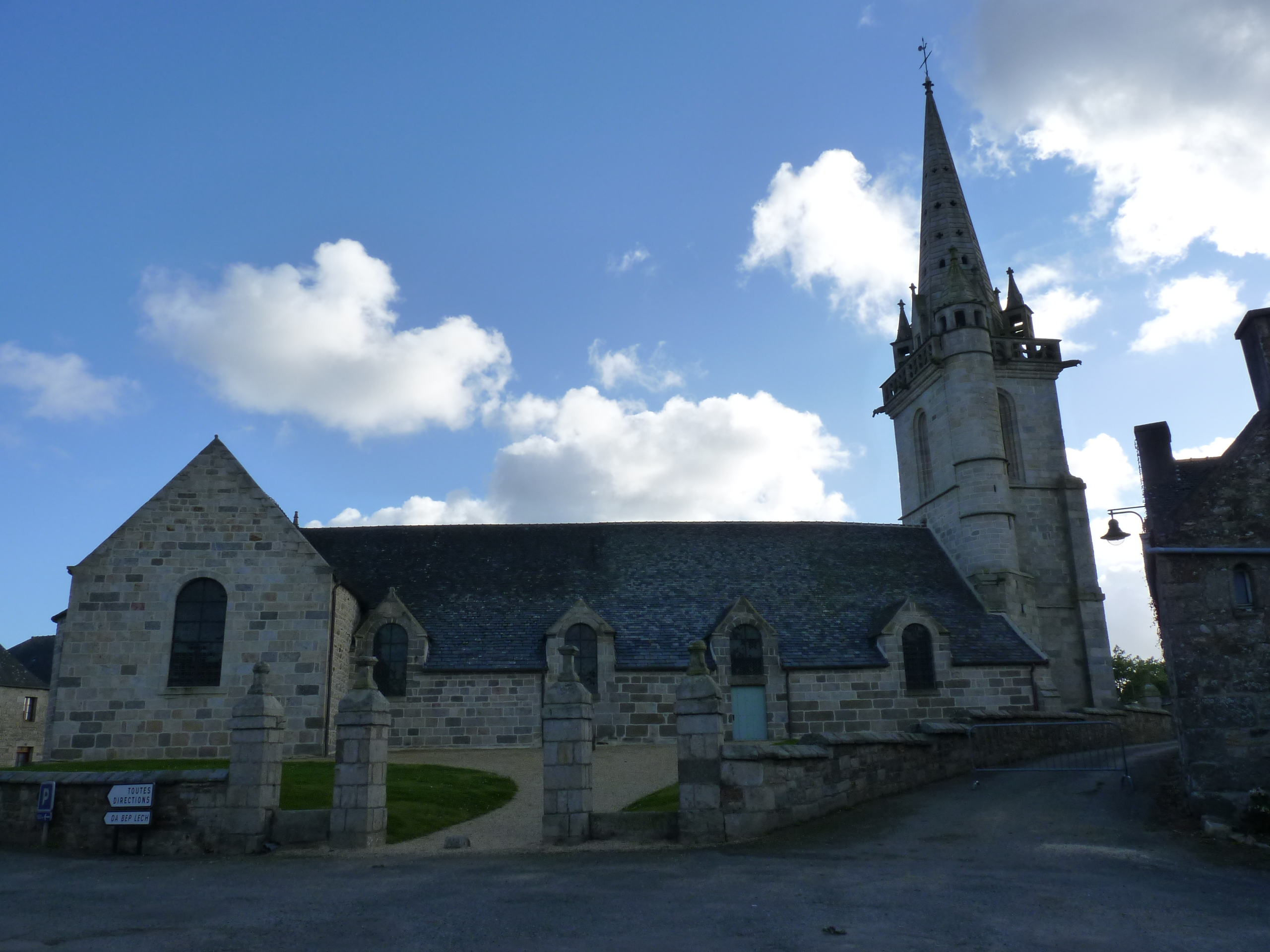 Église Saint-Florent, (Inscription, 1985)